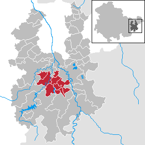 Verwaltungsgemeinschaft Leubatal in Thuringia - District Greiz